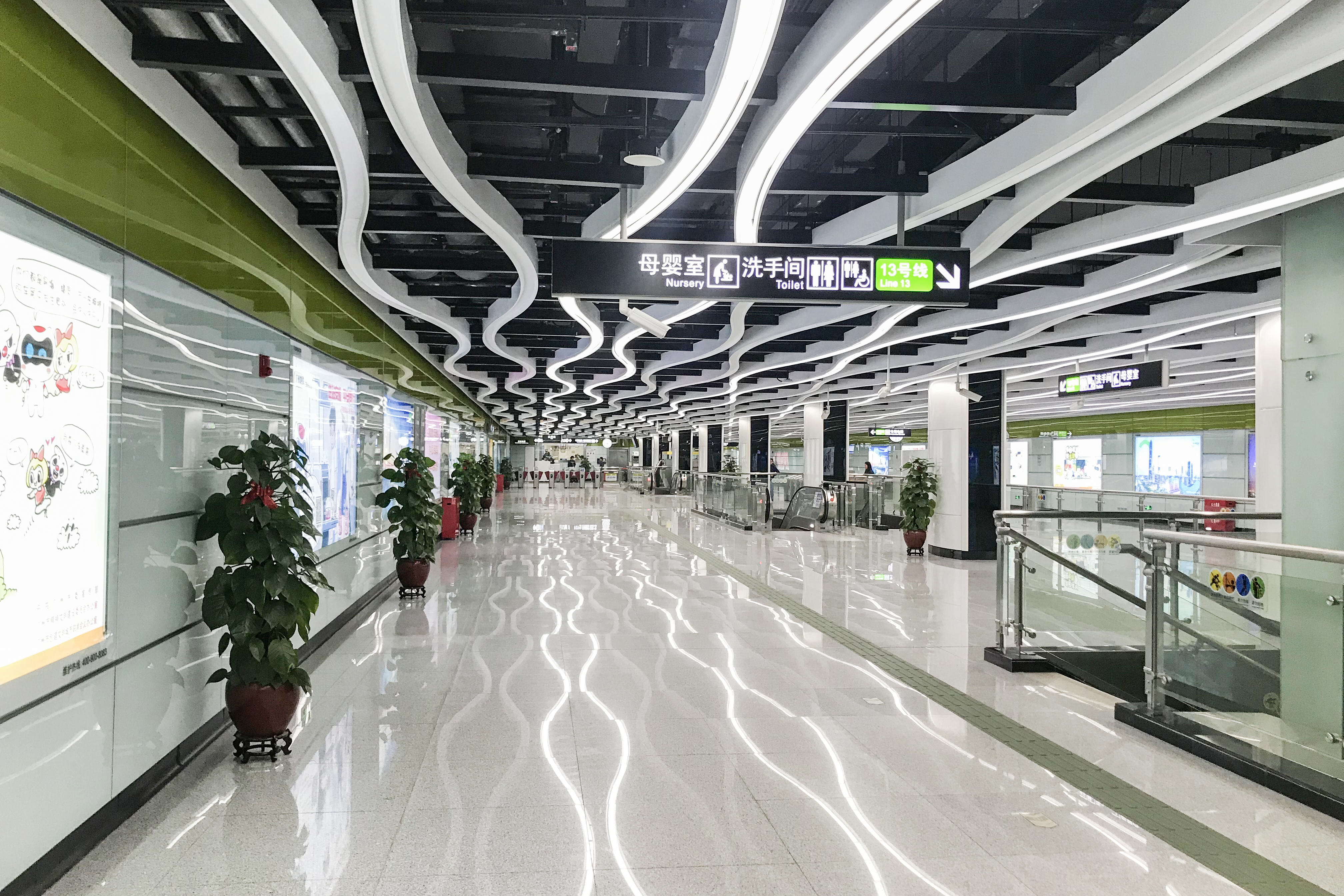 广州地铁沙村站